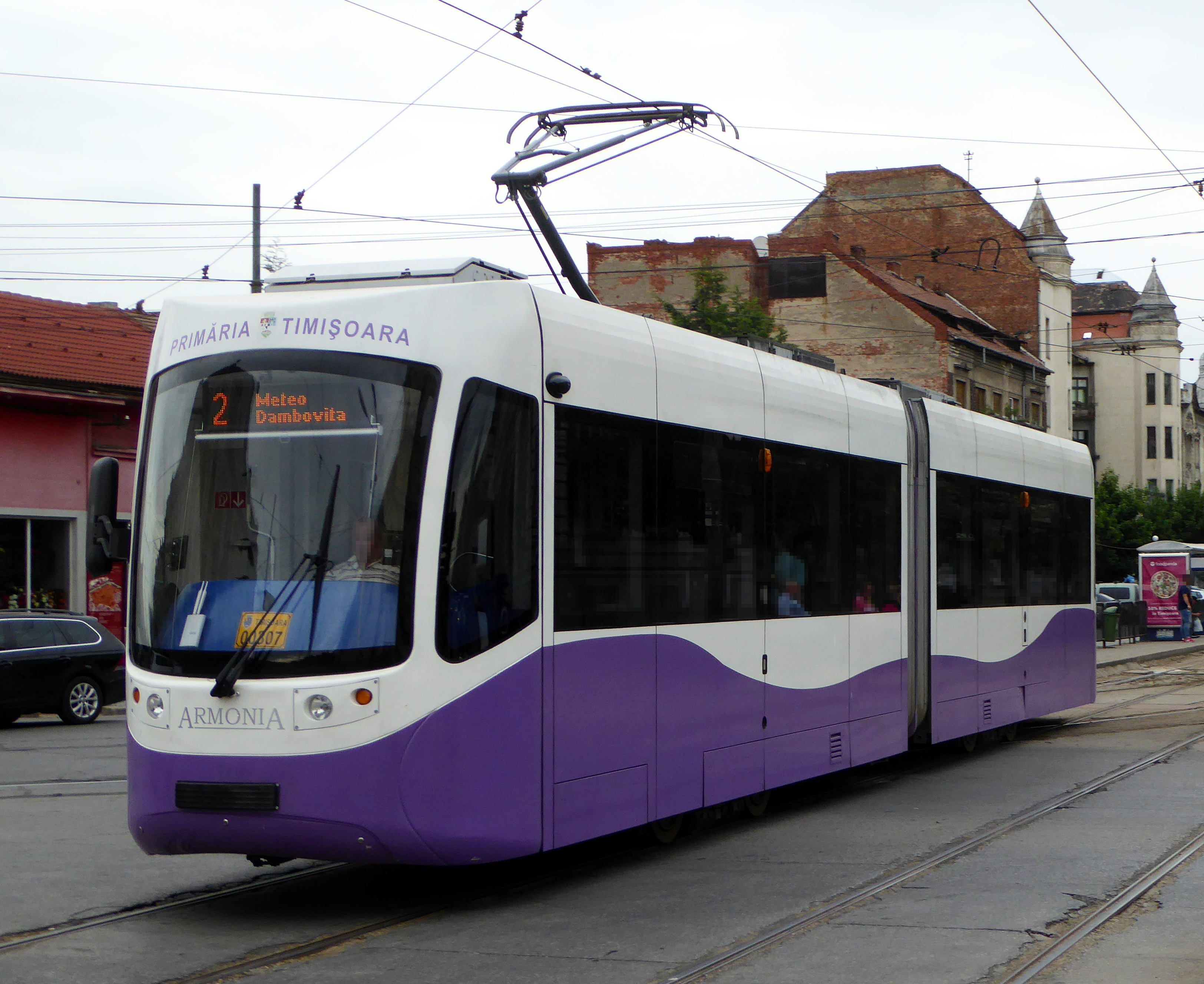 Temeswar, eine Armonia-Tram.